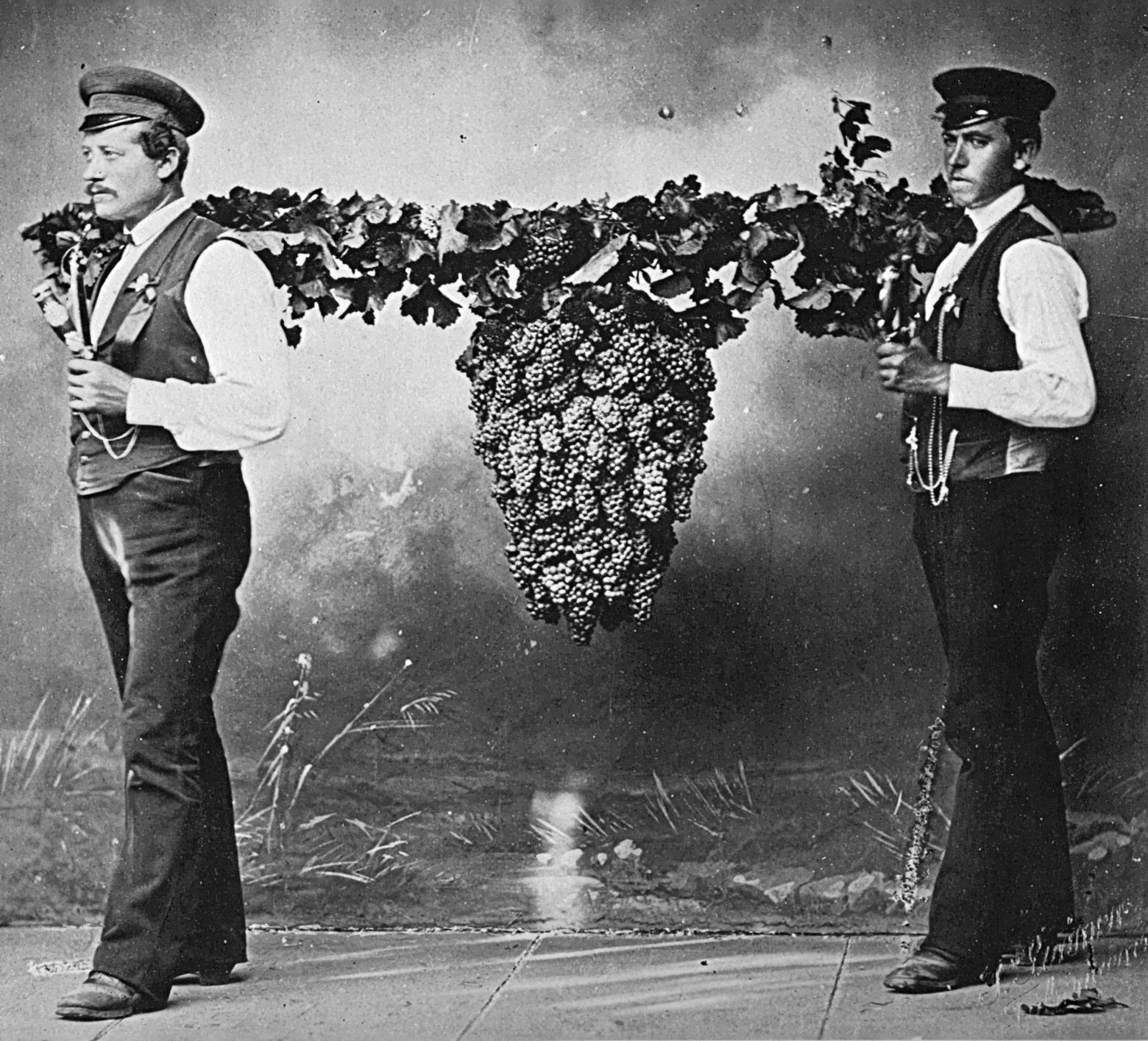 Weingärtner mit Kalebstraube im Atelier, Fotografie 110 × 123 mm)